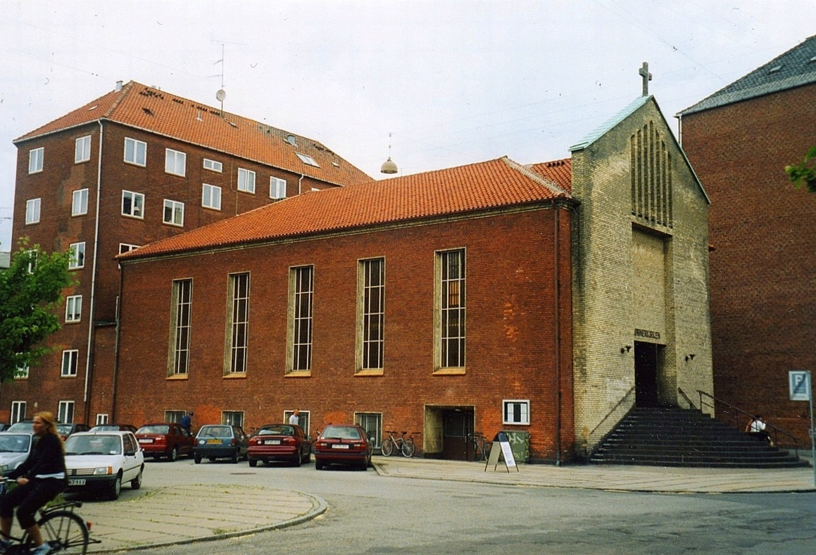 Købner Kirke (baptist), Københavns Kommune